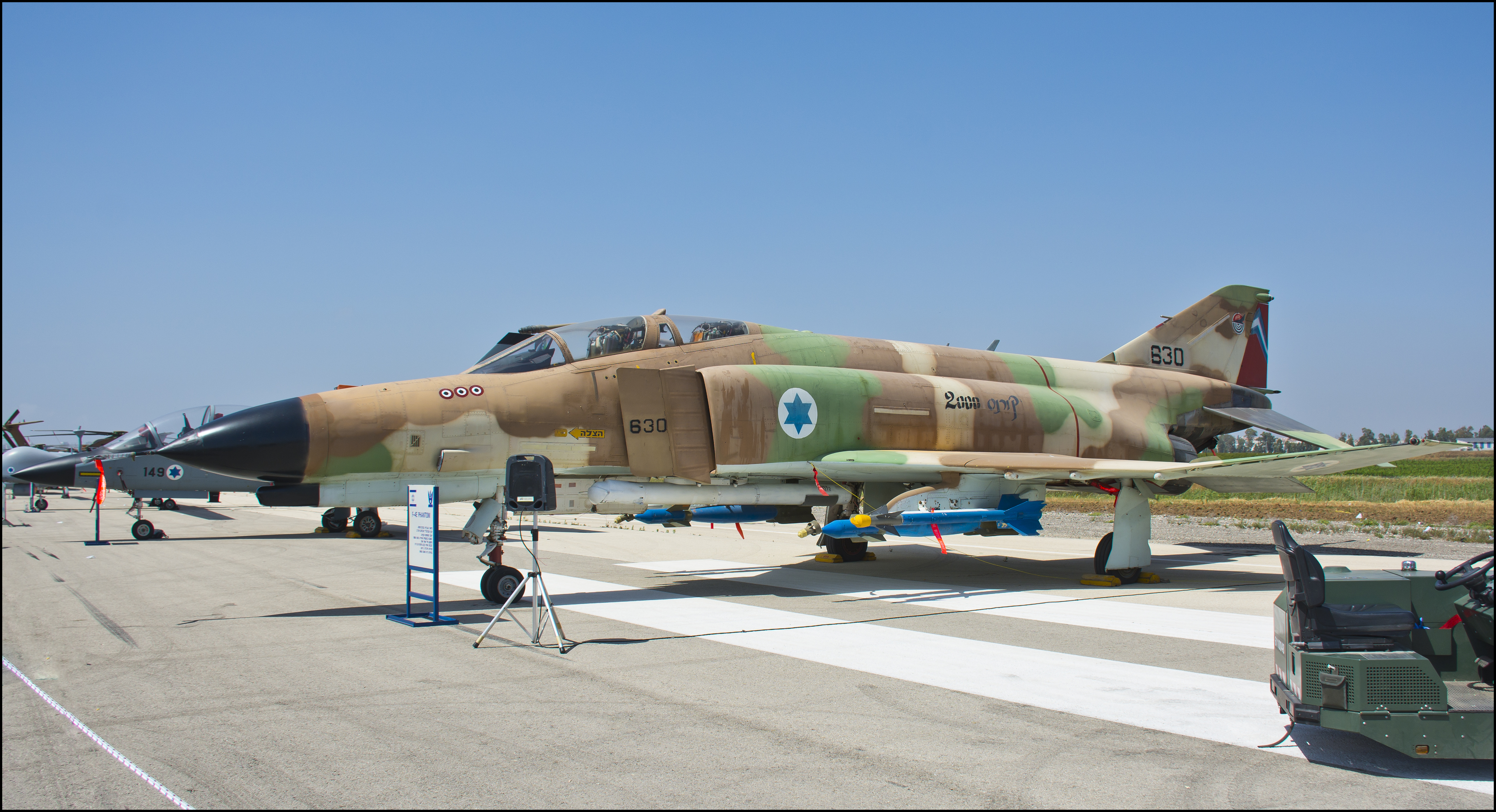 IAF F-4 Phantom "Kornass" retired combat jet, Israeli Air Force, Independence Day 2017 מטוס F-4 פאנטום "קורנס 2000" של חיל האוויר הישראלי, יום העצמאות 2017